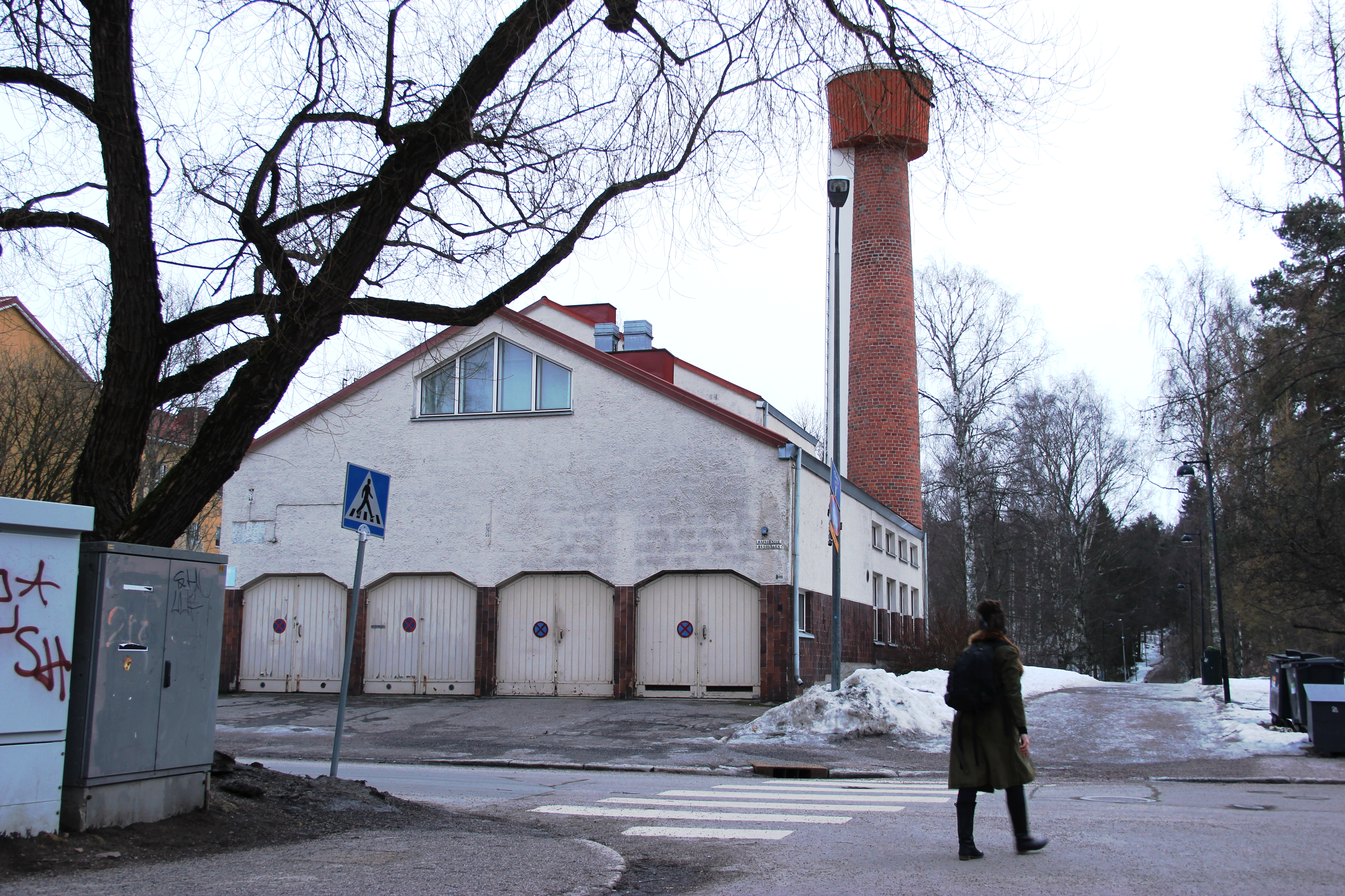 Raisiontien lämpökeskus Ruskeasuolla valmistui 1951, alun perin taloyhtiön lämpökeskus, jossa oli pesula ja autotalli, lämpökeskus kellari. Taaemmassa osassa asuntoja ja toimisto. Arkkitehtitoimisto Woldemar Baeckmann.